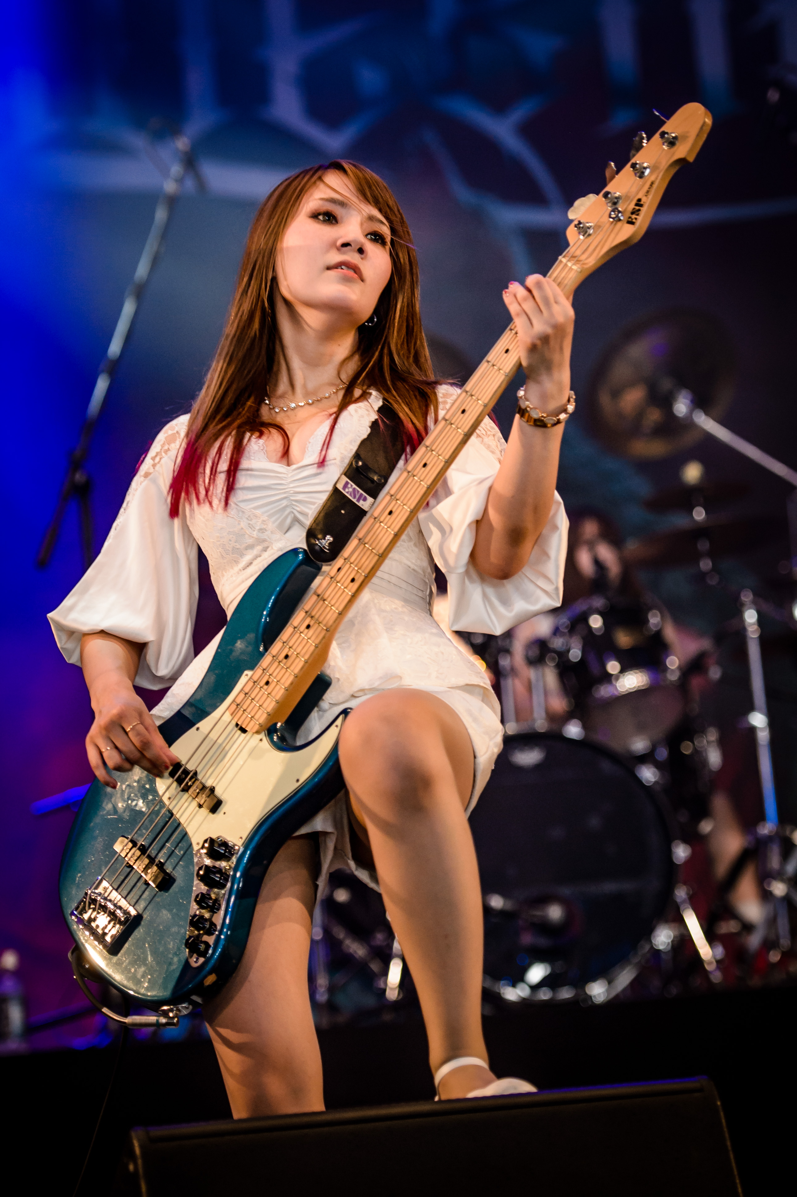 'Wacken Open Air 2018': 'Lovebites'